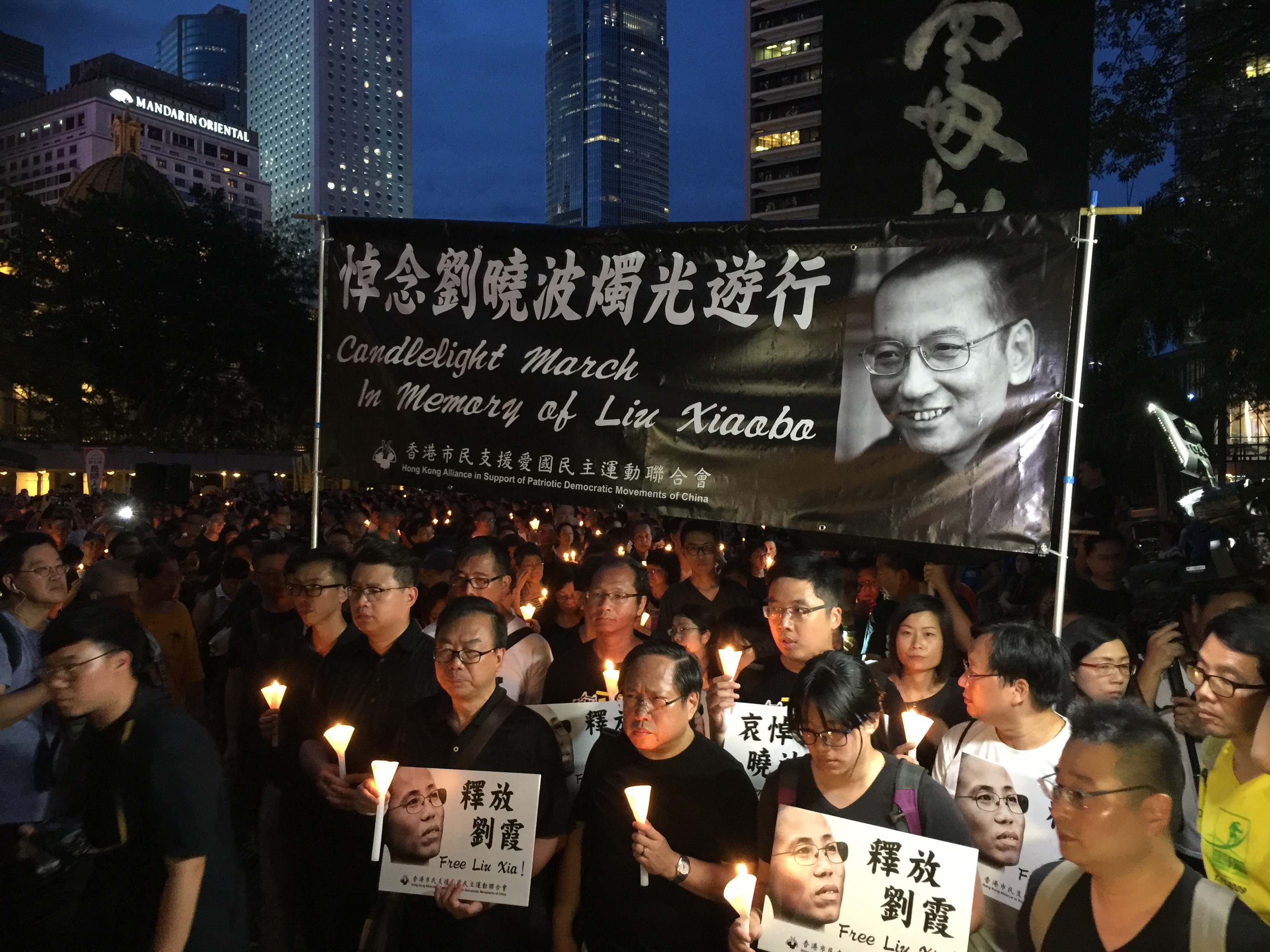 中文（台灣）: 連日來在北京駐港機構中聯辦前設祭壇供民眾獻花及弔唁中國諾貝爾和平獎得主劉曉波的支聯會，7月15日晚發起燭光遊行悼念週四病逝的劉曉波，並強烈要求中國當局讓劉曉波的妻子劉霞真正自由。港人燭光遊行至中聯辦悼念劉曉波（美國之音海彥拍攝）